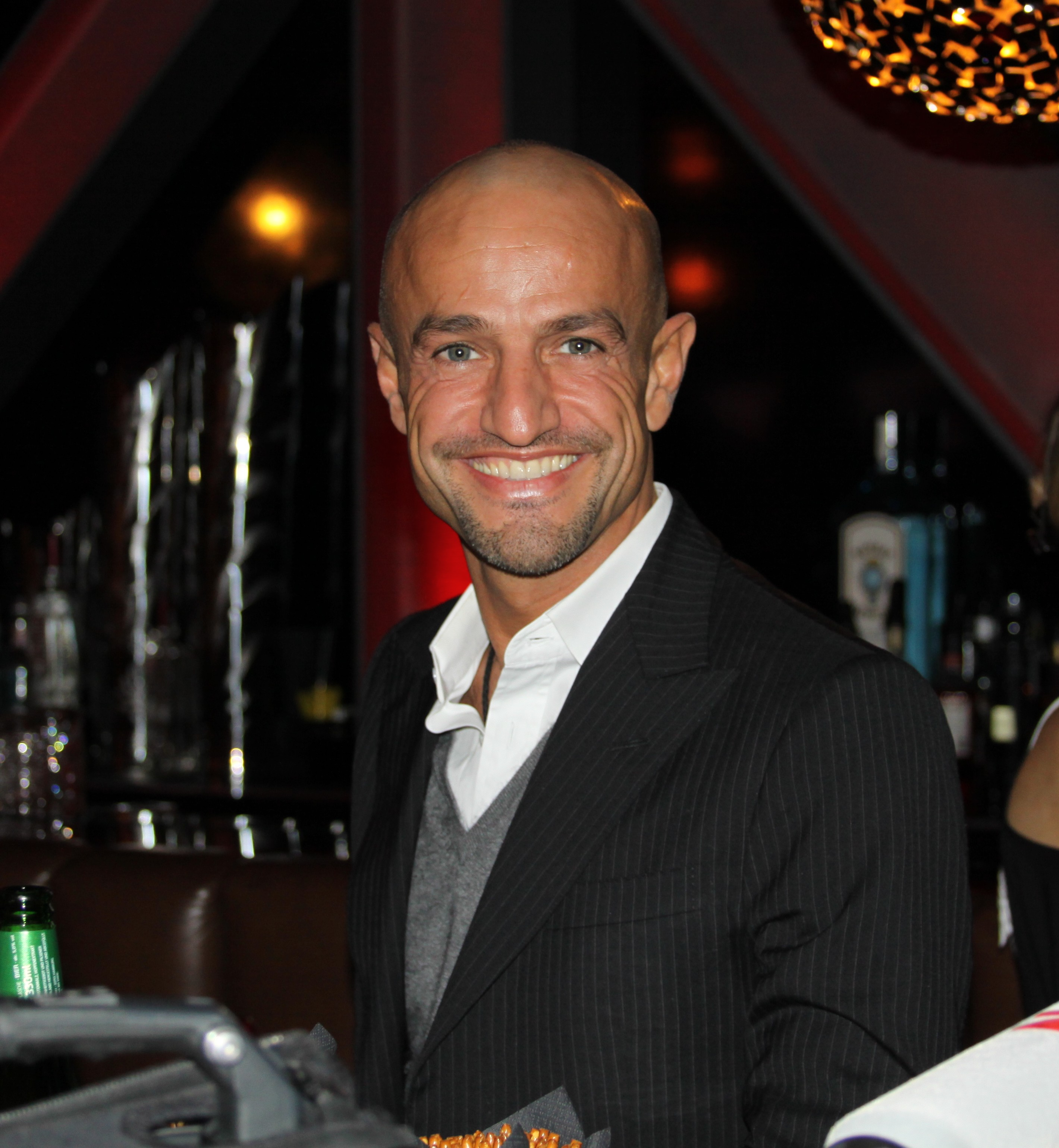 Peyman Armin auf der Fashion Show in Hamburg